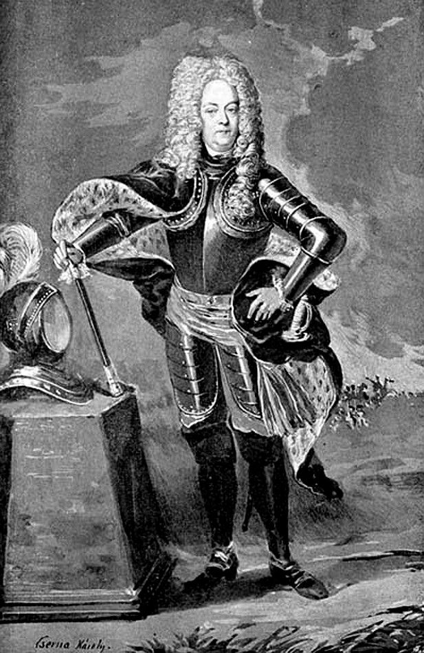 Gróf Pálffy János nádor - rézmetszet